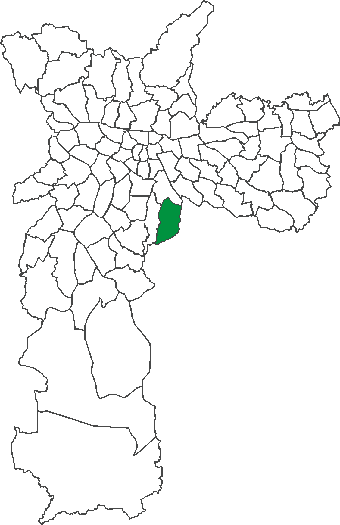 Localização do distrito do Sacomã no município de São Paulo.